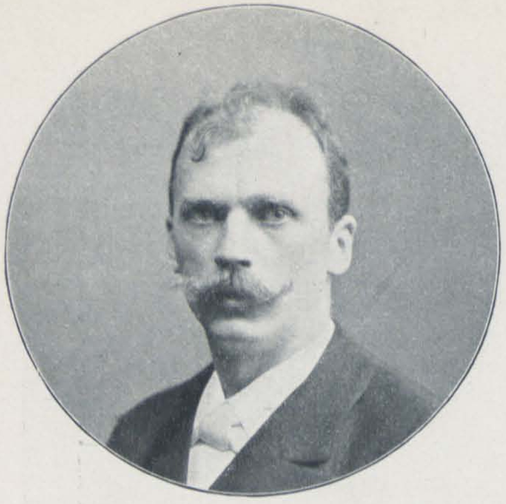 Ernst Wenck (auch: Wenk,1865-1929), deutscher Bildhauer, aufgenommen 1899.